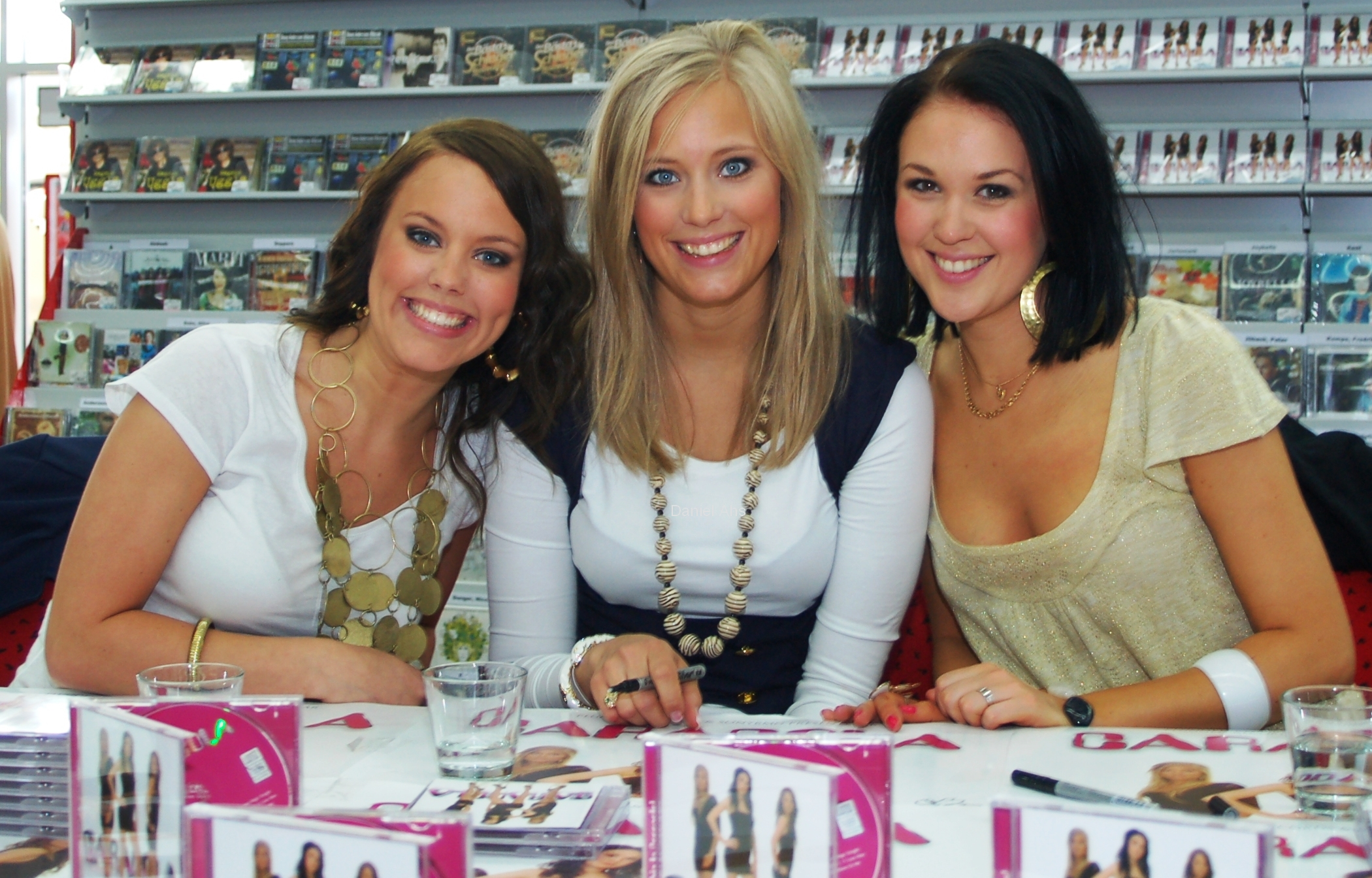 Caracola skriver autografer i Norrköping.